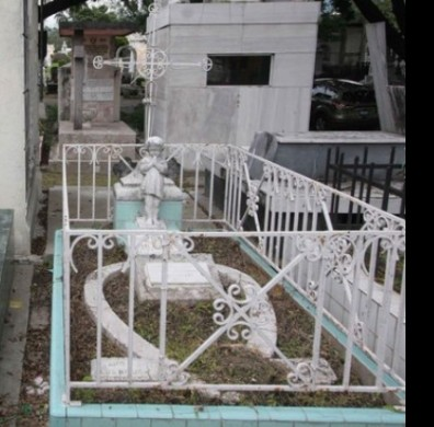 Tumba de Salvador Salazar Arrué(Salarrue). situada en el Cemenerio los Ilustres